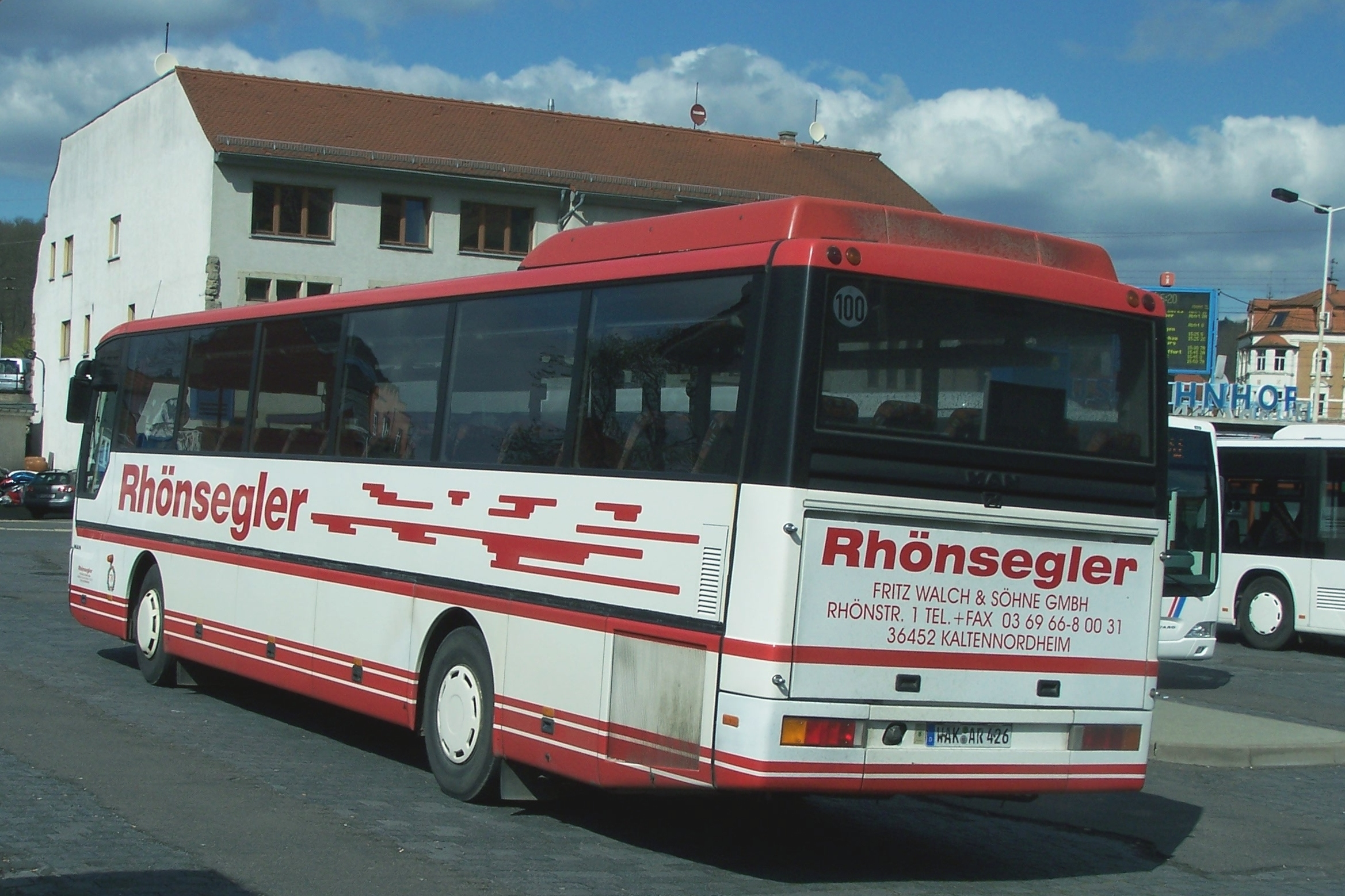 Ein Bus des in Kaltennordheim ansässigen Fuhrunternehmens Fritz Walch und Söhne.